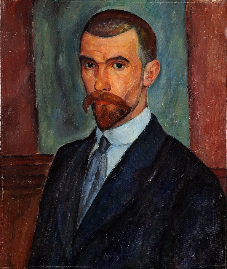 Självporträtt, cirka 1910.